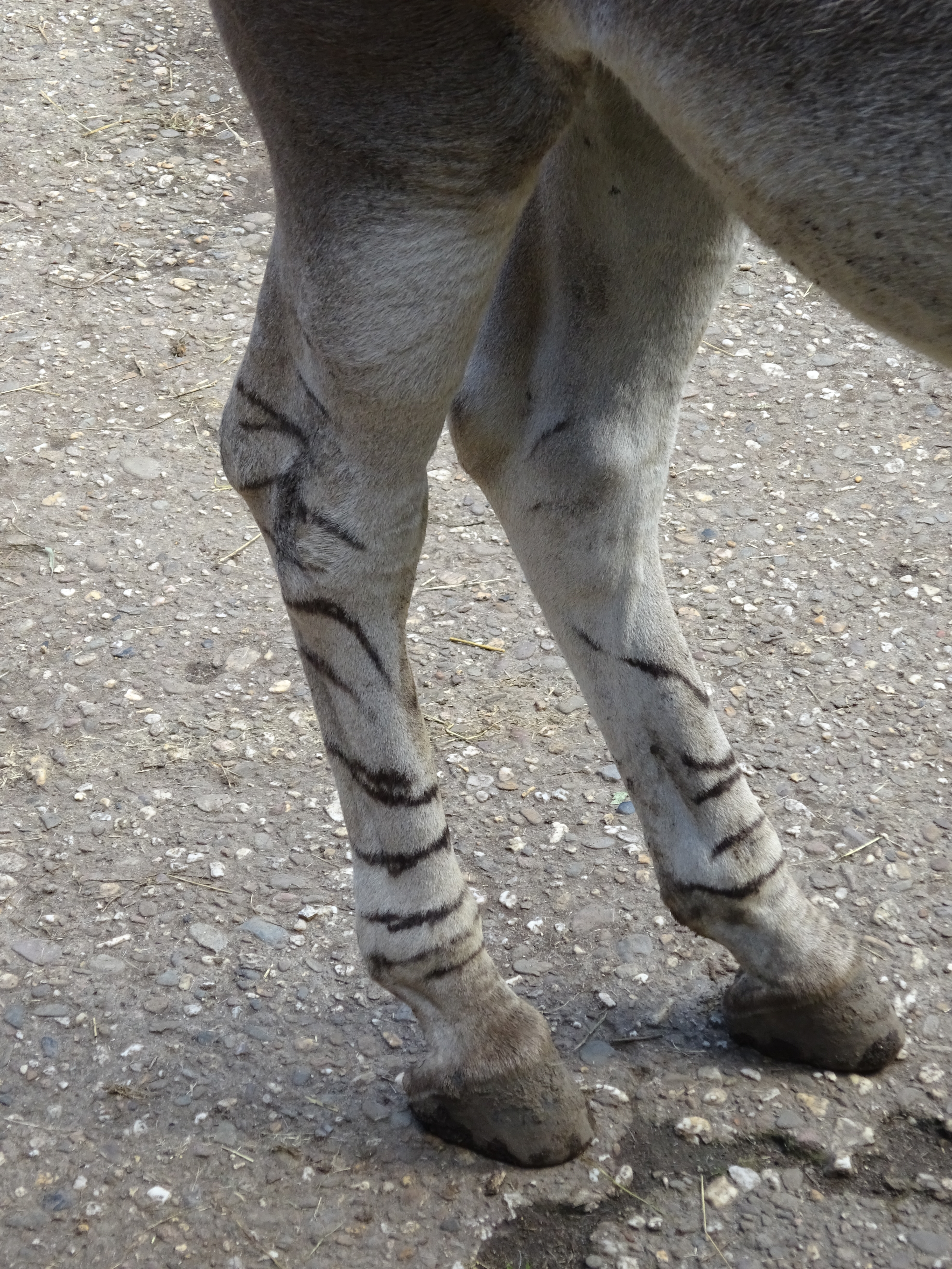 Tiergarten Kleve, Somali Wildesel